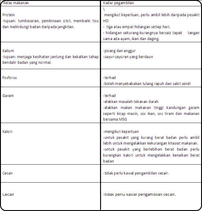 DIET PEMAKANAN UNTUK PESAKIT YANG MENGGUNAKAN RAWATAN DIALISIS PERITONEUM (PD)